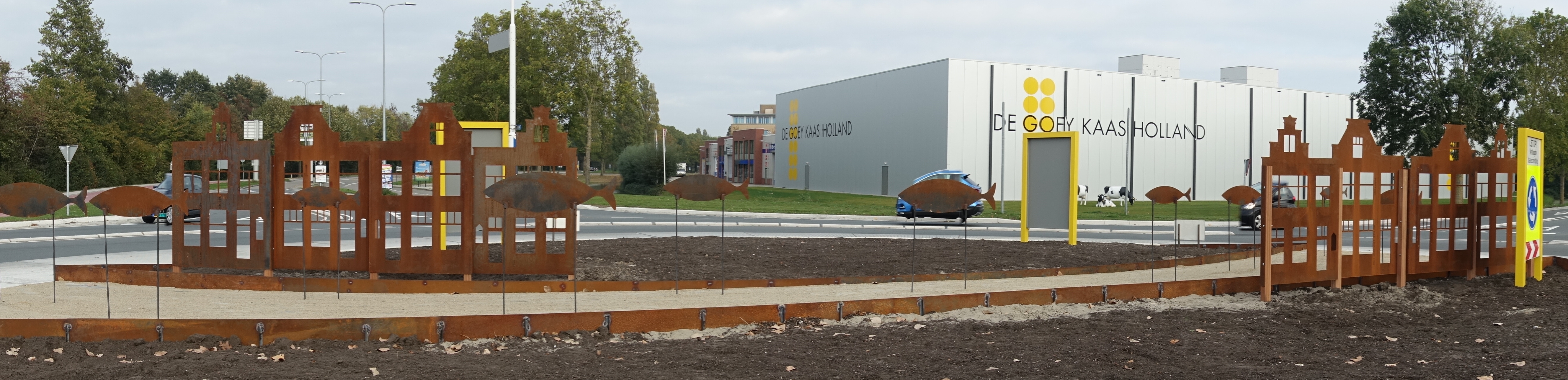 De nieuwe rotonde op de kruising van de Wulverhorstbaan en Middelland baan is sinds kort voorzien van een ontwerp waarin het Wonder van Woerden een rol speelt. Op de rotonde staan platte huizen van cortenstaal. Daartussen loopt symbolisch de rivier de Rijn. Tussen de huizen en boven het water zwemmen grote vissen. Dit zijn de snoeken die in 1575 opeens beschikbaar kwamen voor de hongerende bevolking. De stad werd tijdens de tachtigjarige oorlog belegerd door de Spanjaarden. Het Wonder van Woerden heeft hiermee een plek gekregen op hetzelfde moment dat in de hal van het Stadsmuseum het schilderij van de belegering vertoond wordt. Binnenkort brengt de Aar Hoveniers ook de beplanting aan op de rotonde.